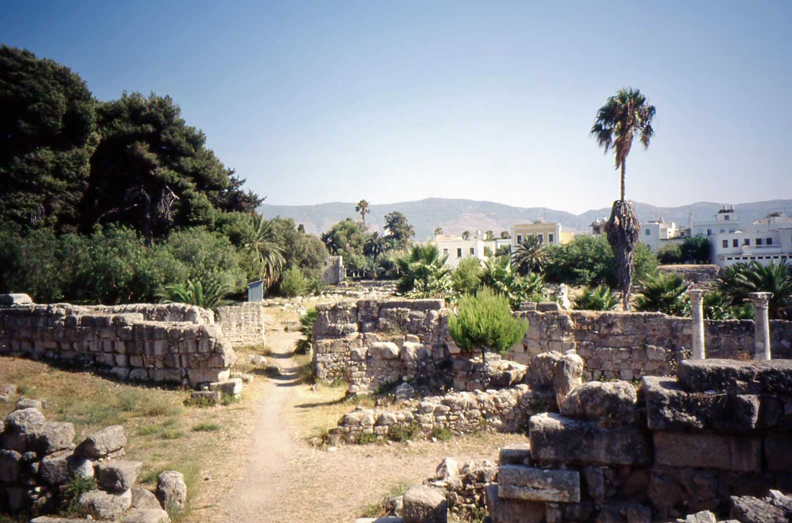 Die Agora in Kos Stadt